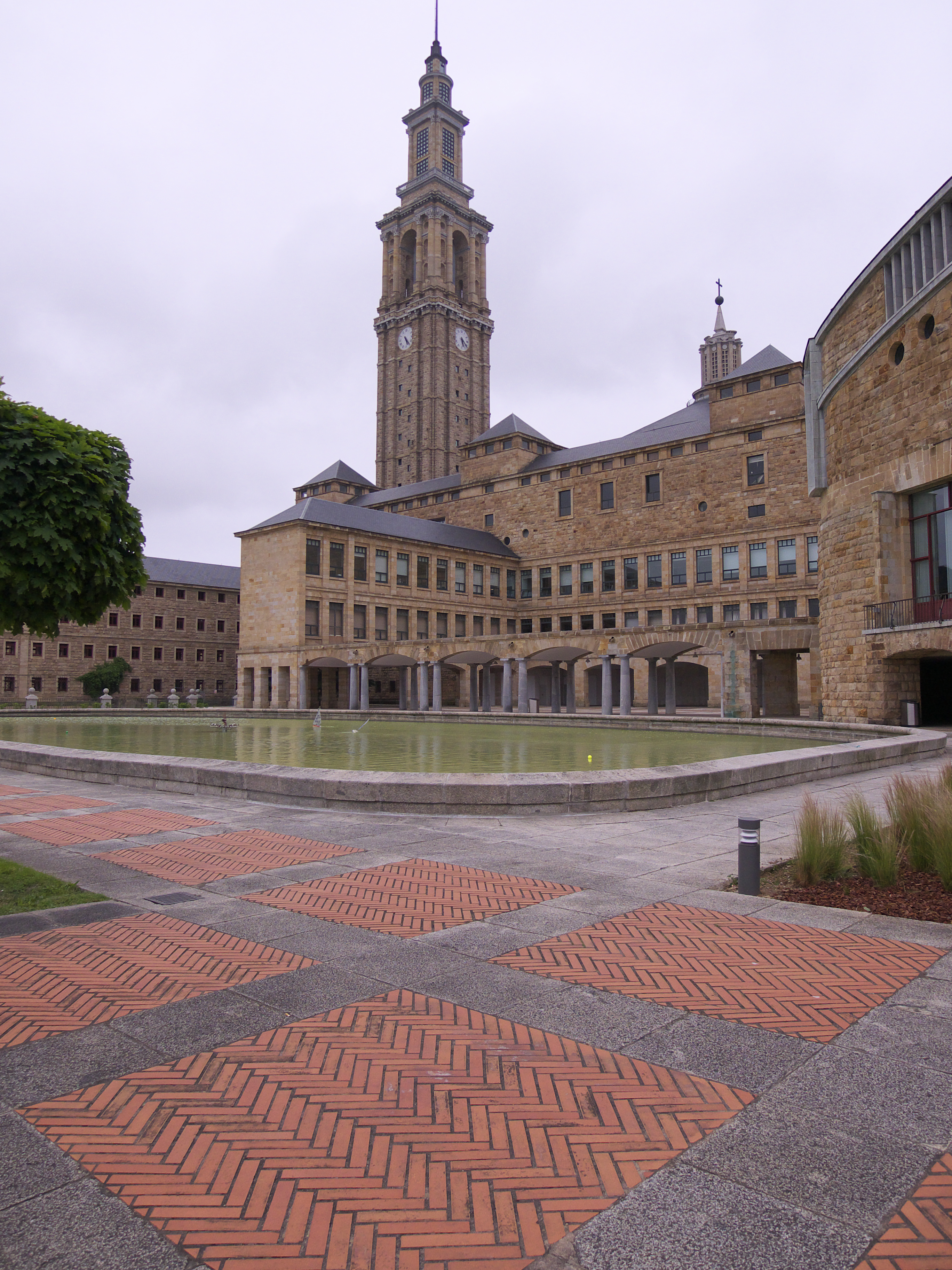 La torre de la universidad y sus ciento treinta metros de altura